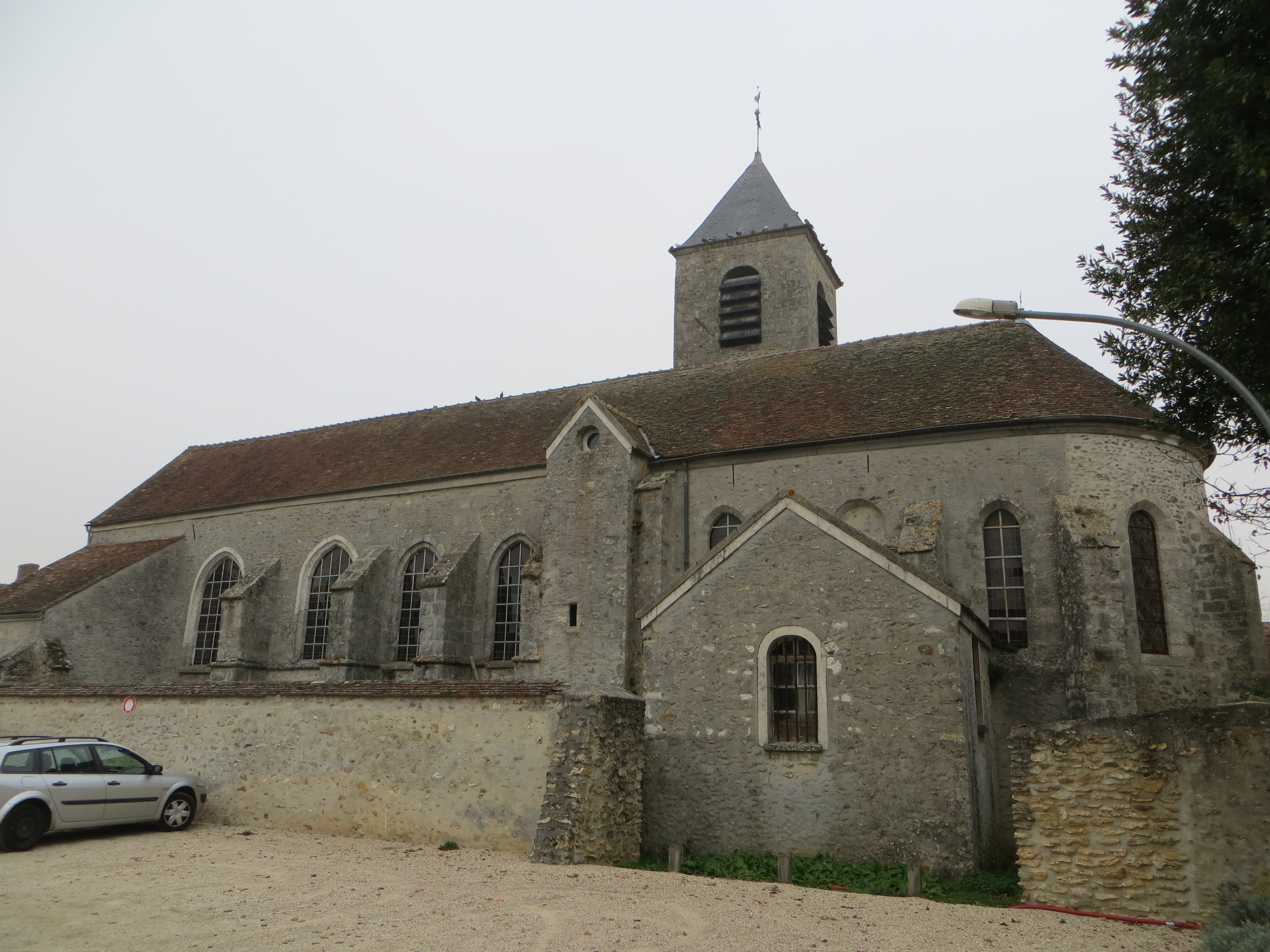 Vue générale de l'église